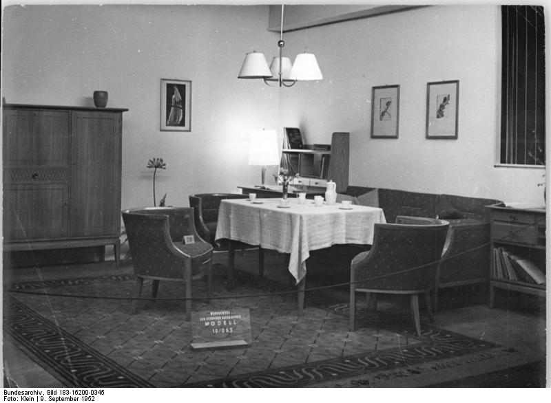 Leipzig, Messe, Musterwohnzimmer Leipziger Messe 1952 - Schaufenster des friedlichen Aufbaus. Vom 7. - 17. September 1952 findet die internationale Leipziger Messe als große Technische Messe und Mustermesse in 13 Messehallen (75000 qm) auf einem ausgedehnten Freigelände (25000 qm) und in 15 Messehäusern (80000 qm) statt. Möbelausstellung im Messehaus "Union" UBz: Wohnzimmer-Entwurf von Prof. Horst Michel Zentralbild-Klein 9.9.1952